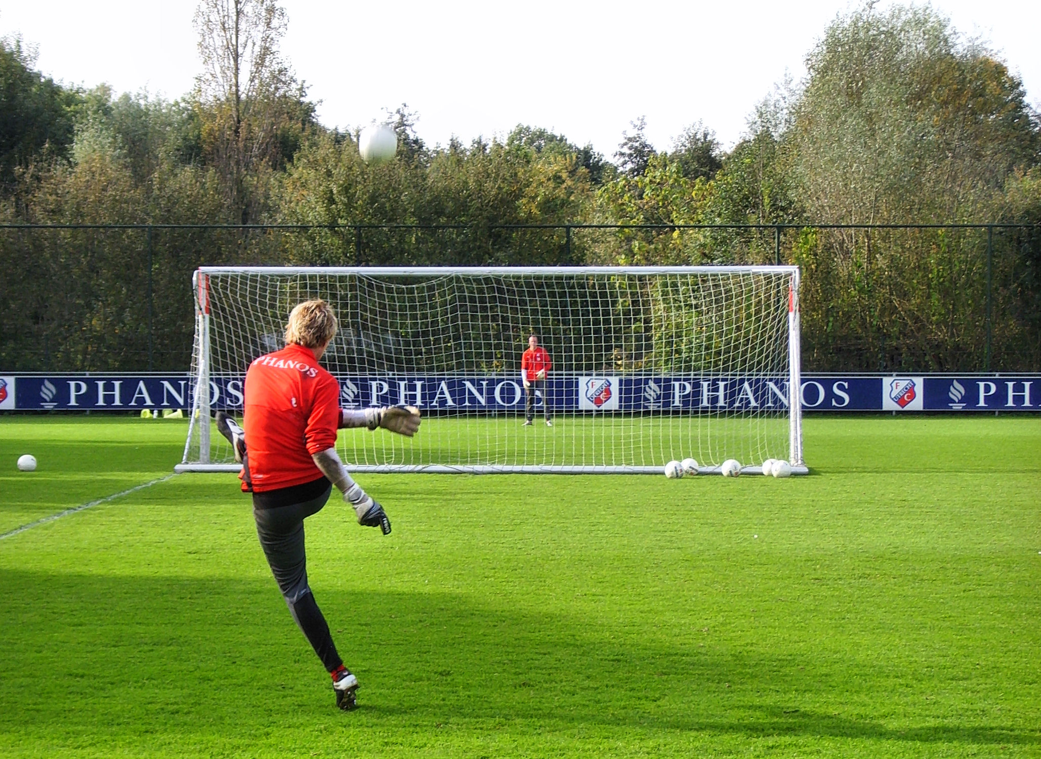 Keeperstraining bij voetbalclub FC Utrecht. Tweede en derde keeper André Krul en Wesley de Ruiter (achter) schieten de bal over het doel heen, waarna de ander hem in de lucht dient te vangen. - Google Maps - Google Earth